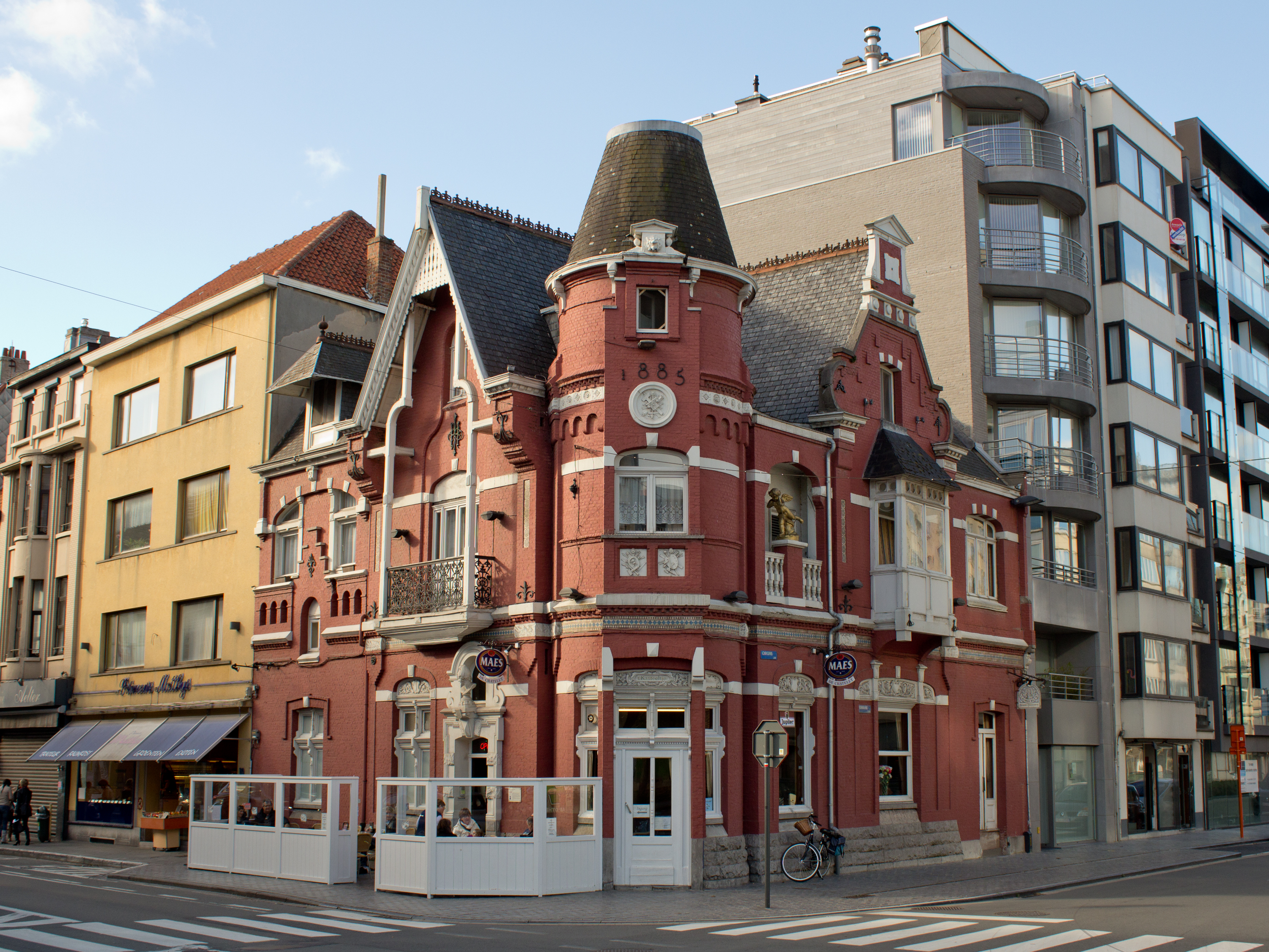 Eclectisch hoekpand Chatelet, Oostende